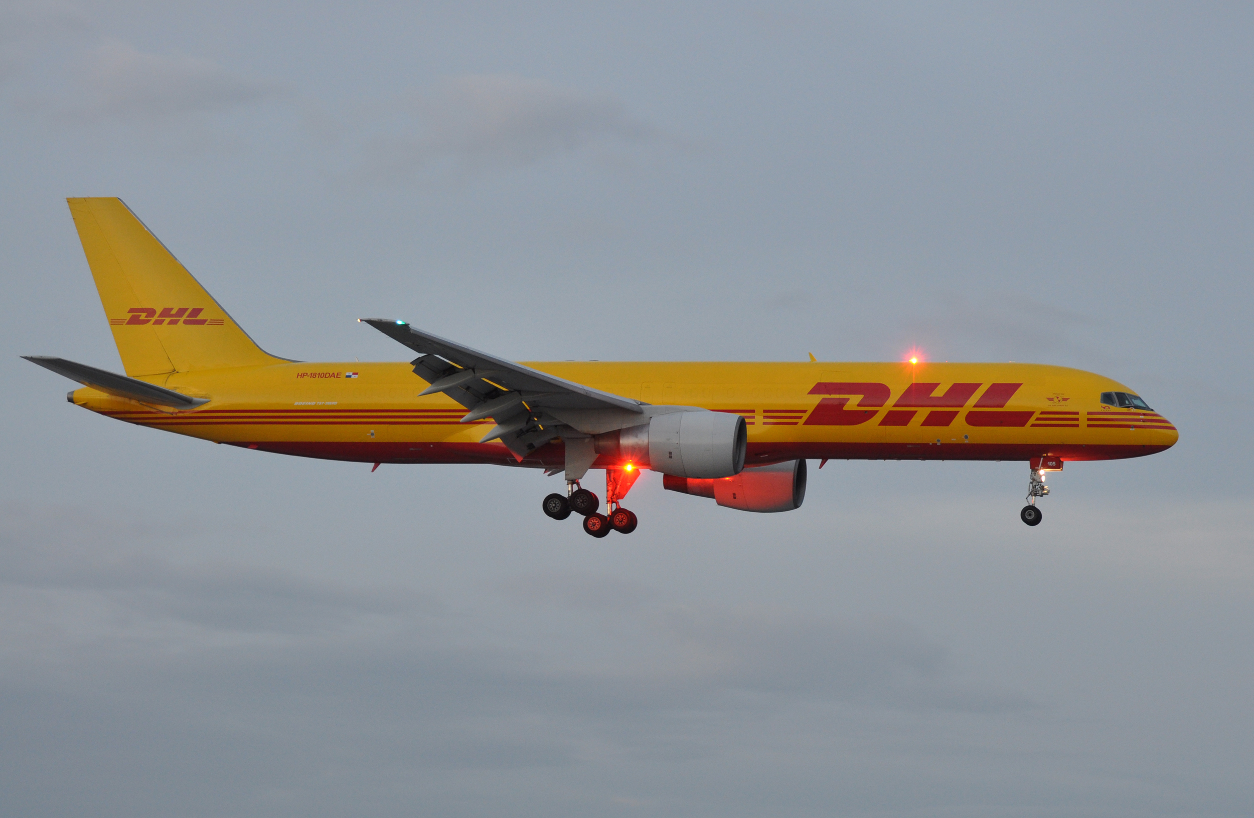 MSN 29611 B757-27 APCF DHL AERO EXPRESSO (PANAMA) MIA